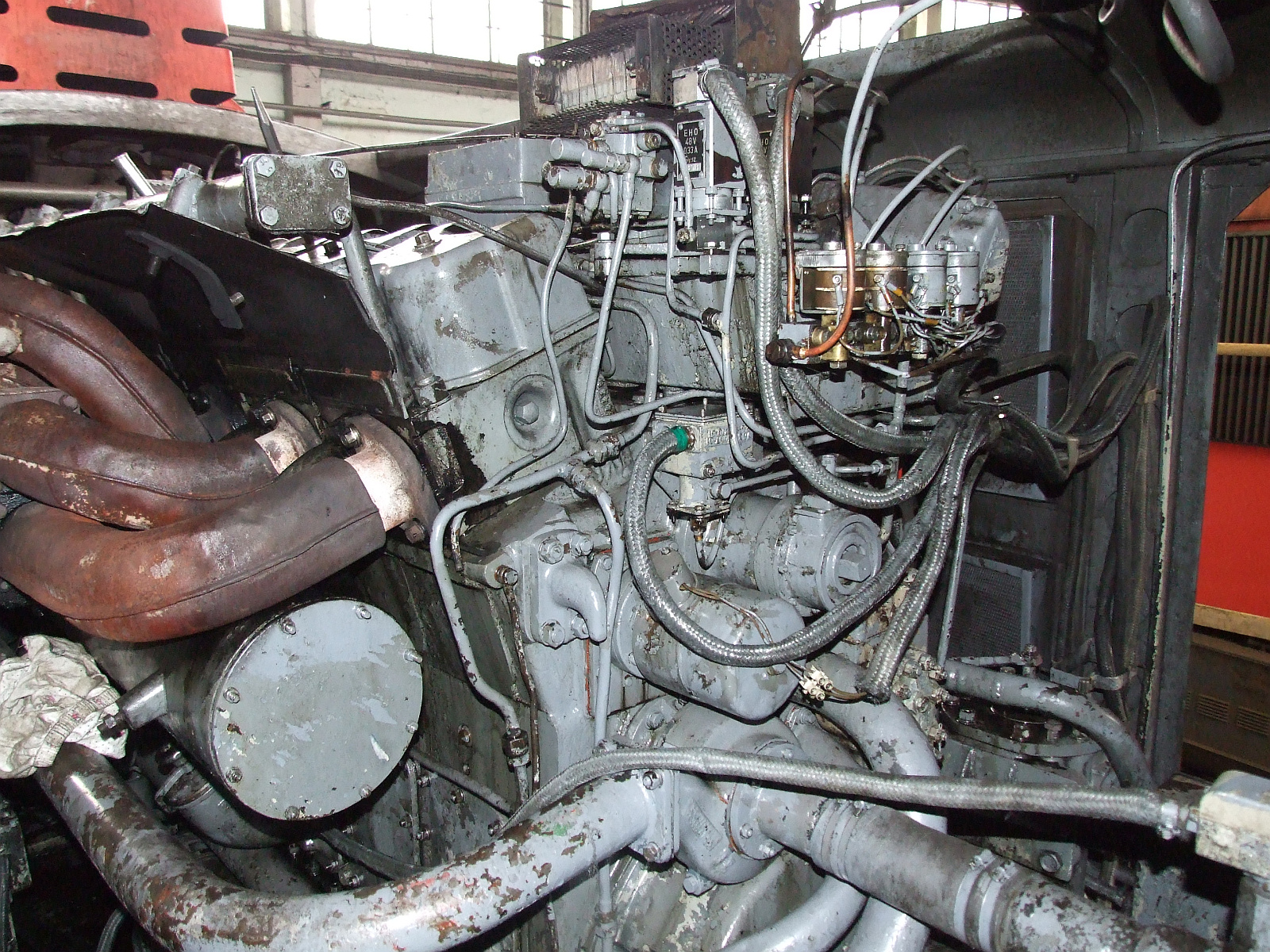 A mozdonyokba épített Ganz-Jendrassik 16 VFE 17/24 típusú dízelmotor a segédüzemi hajtás felől.